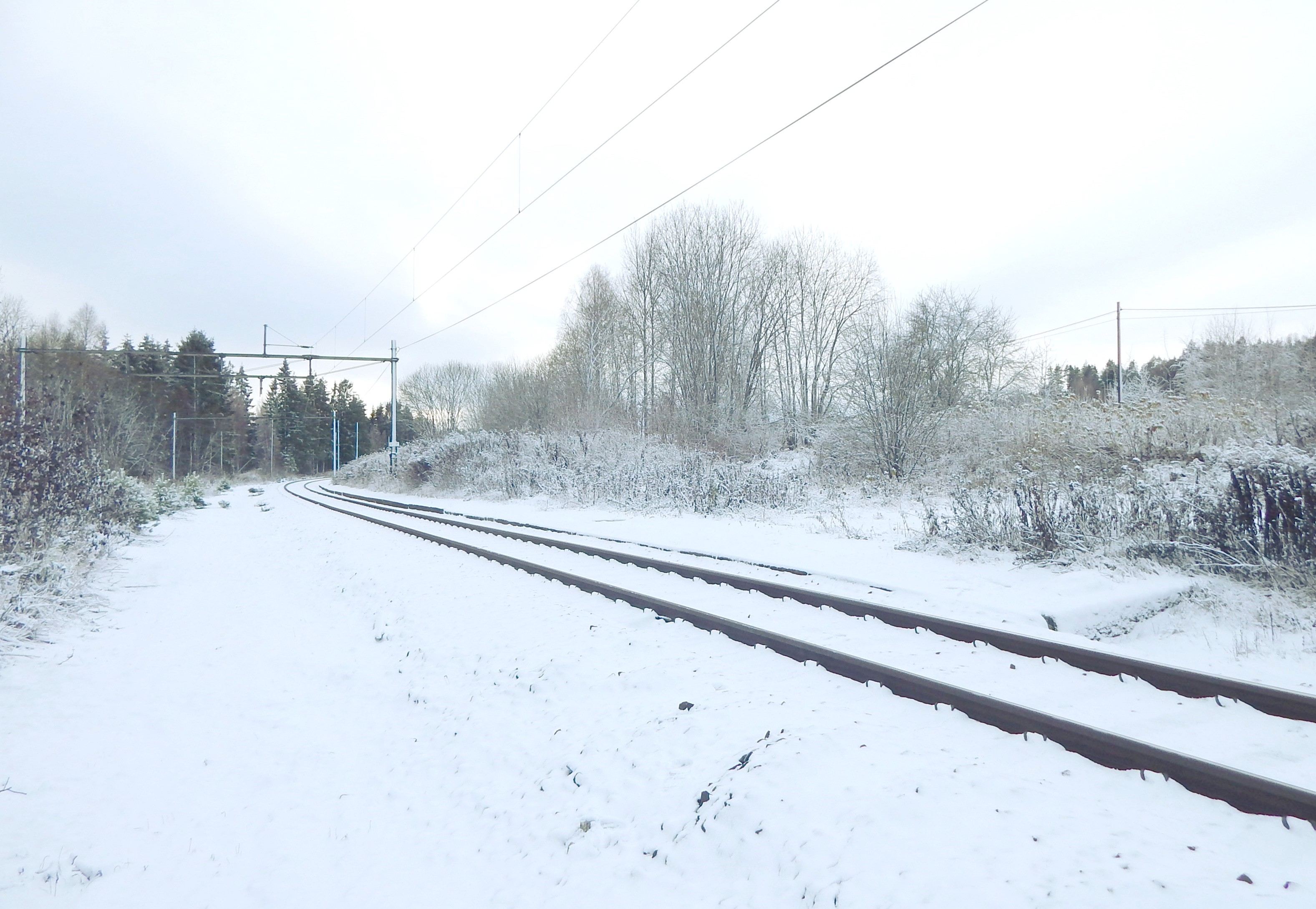 Burud stasjonsområde